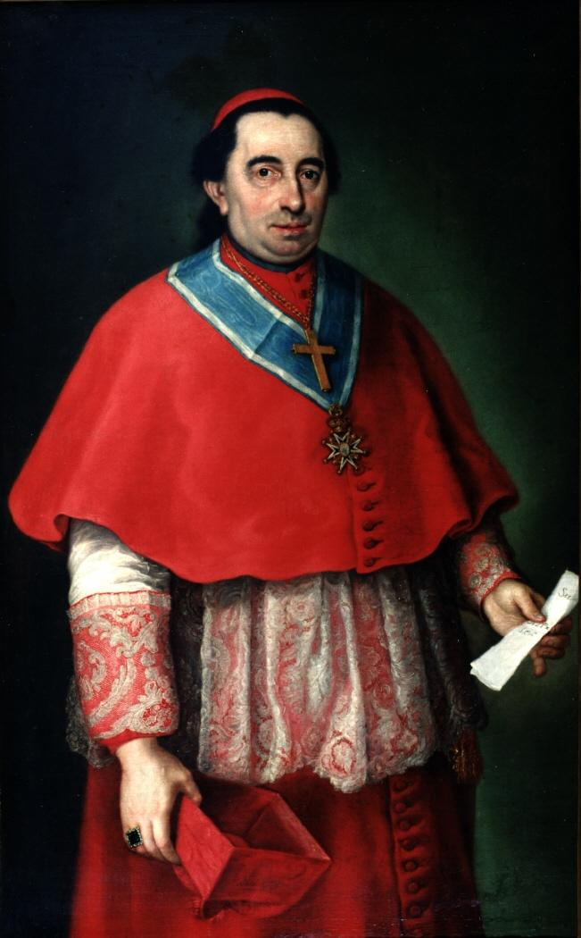 Retrato del eclesiástico español Antonio Sentmenat y Cartella (1734-1806), que fue obispo de Ávila, cardenal de la Iglesia Católica y patriarca de las Indias Occidentales.